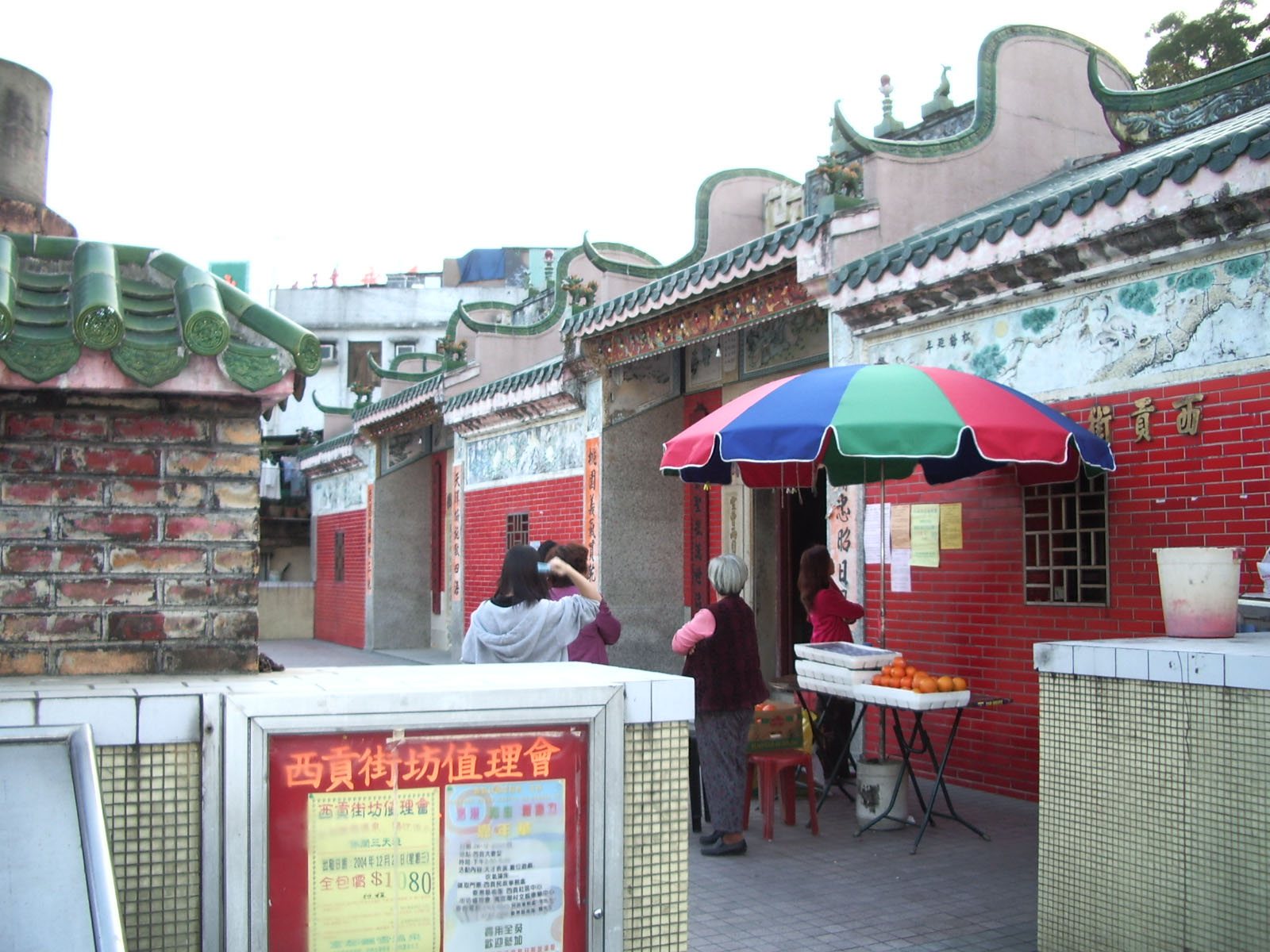 Sai Kung Tin Hau Temple, Sai Kung, Hong Kong.